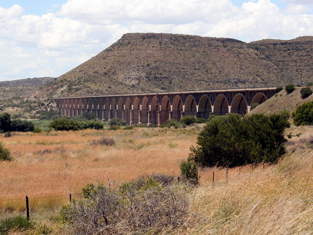 Hennie Steyn Bridge over Gariep dam